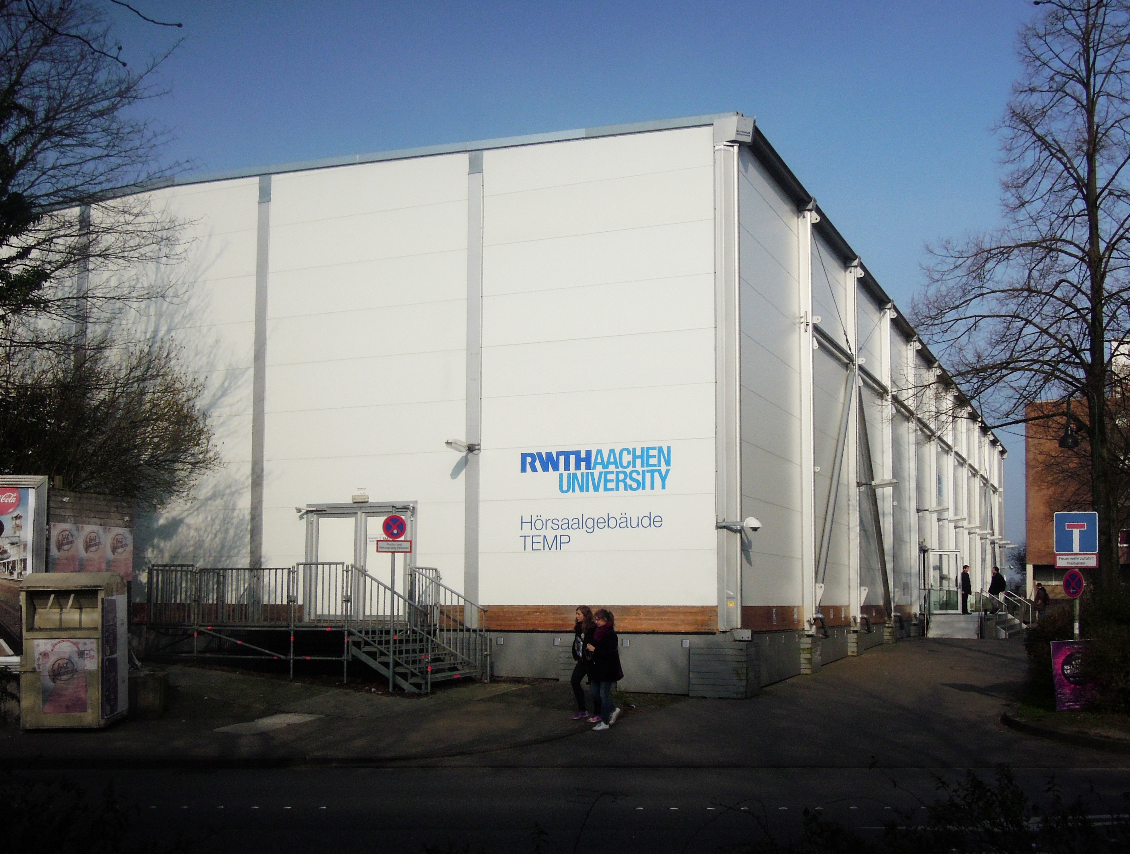 Temporäres Hörsaalgebäude TEMP der RWTH Aachen am Republikplatz